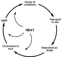 Bu, tekdüzeliklik tarafından tanımlanan kayaç oluşturma süreçlerini gösteren bir diyagramdır.